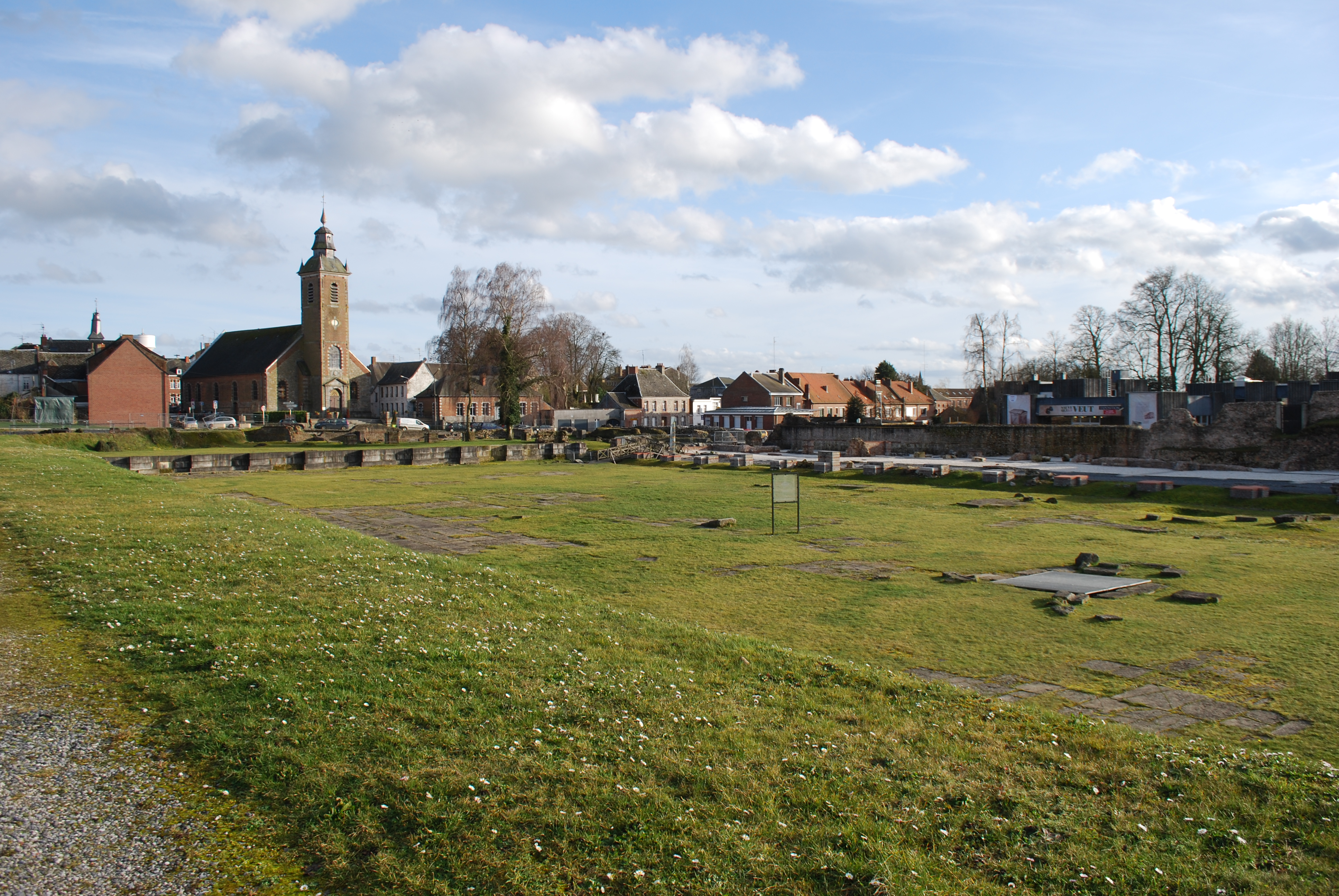 Vue de Bavay (Nord, France).